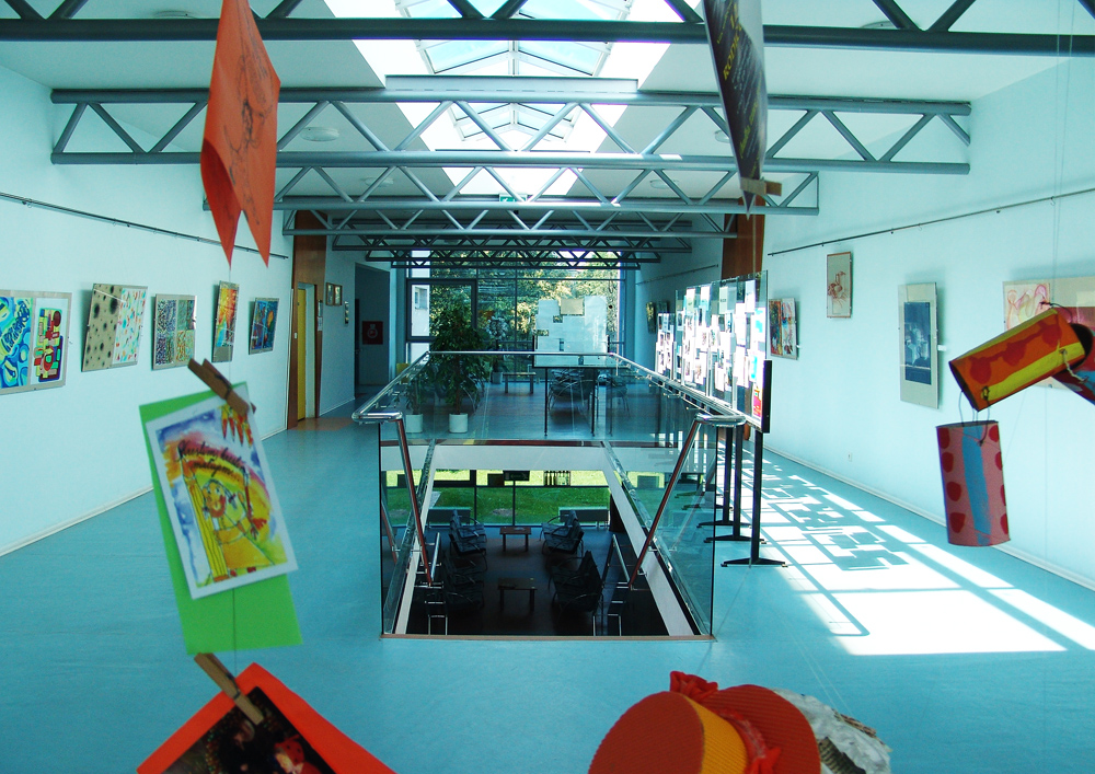 priestory PF